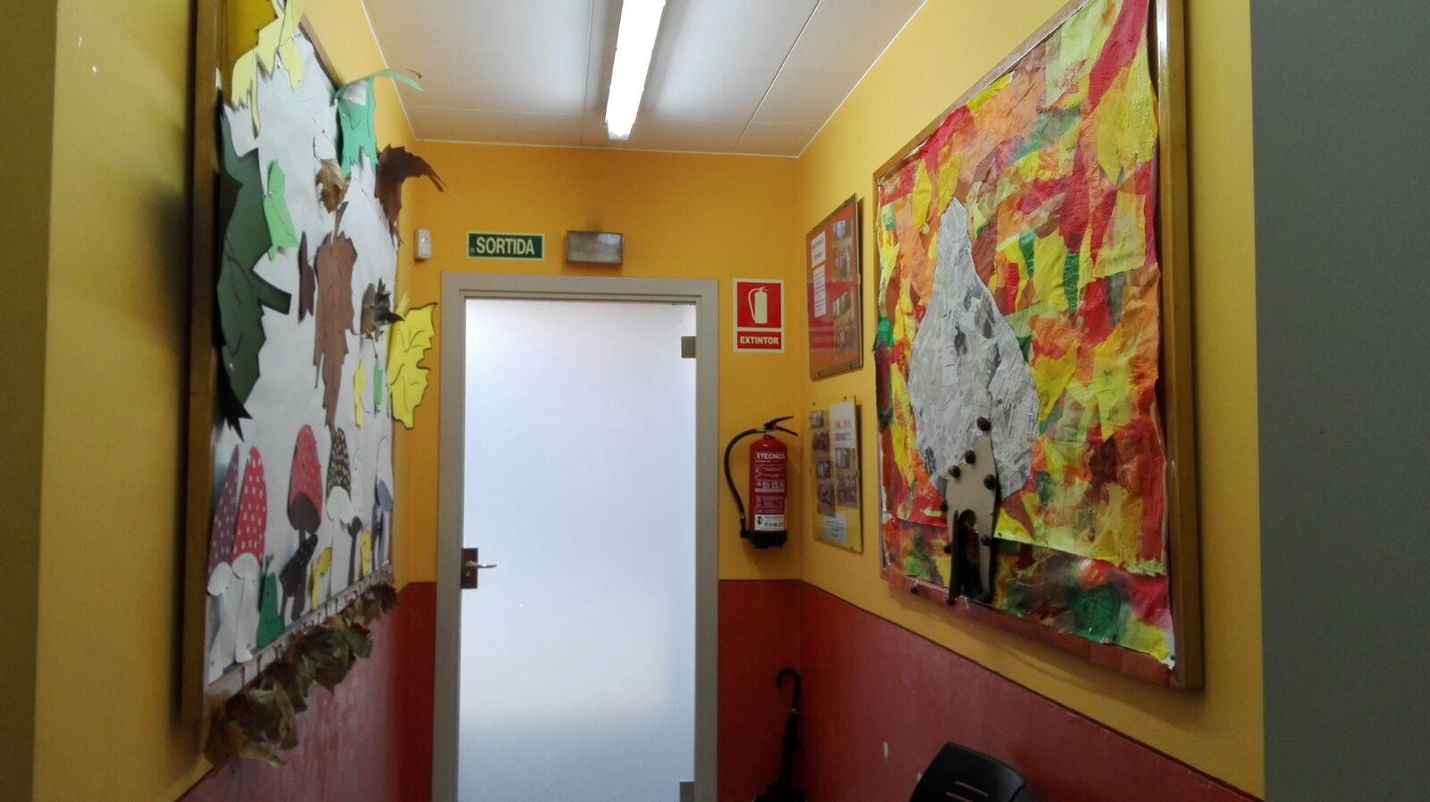 Els recursos materials són imprescindibles pel que fa a la influència de les activitats educatives que es realitzen. Pel que fa a l'arquitectura del centre, podem dir que l'edifici que ocupa actualment el Centre Obert del Tripijoc és el número 52 del carrer Enric Delaris de Manlleu. Des de fora es pot comprovar que la part de la façana, planta baixa, ha estat millorada recentment. Compten amb una entrada àmplia amb un plafó d'anuncis destinats, majoritàriament, als infants i joves. En creuar la porta ens trobem amb un espai molt colorit, decorat amb tot d'activitats realitzades pels nens i nenes, ben diferent del gris de l'exterior. En concret, plafons ambientats i adaptats a l'època de l'any del moment: la tardor.